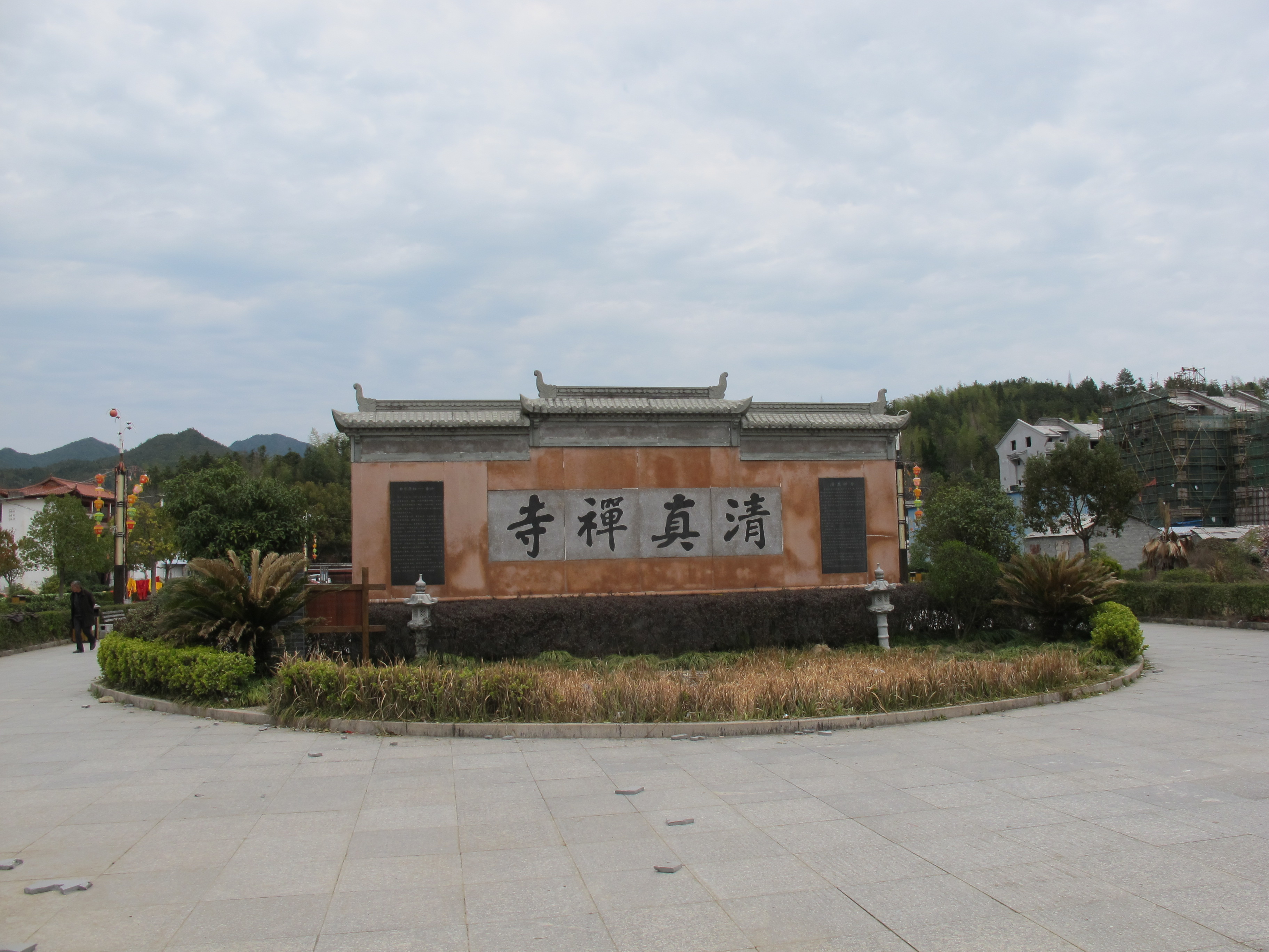 阜山清真禅寺照壁